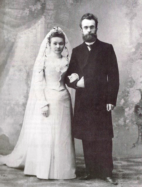 Лидия Васильевна и Николай Фёдорович (впоследствии архиепископ Хайларский Димитрий) Вознесенские, родители митрполита Филарета (Вознесенского)